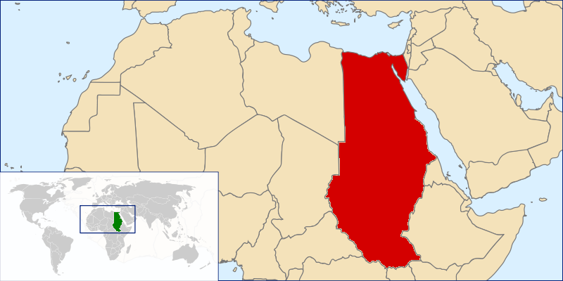 mappa del regno d'egitto 1922 - 1953